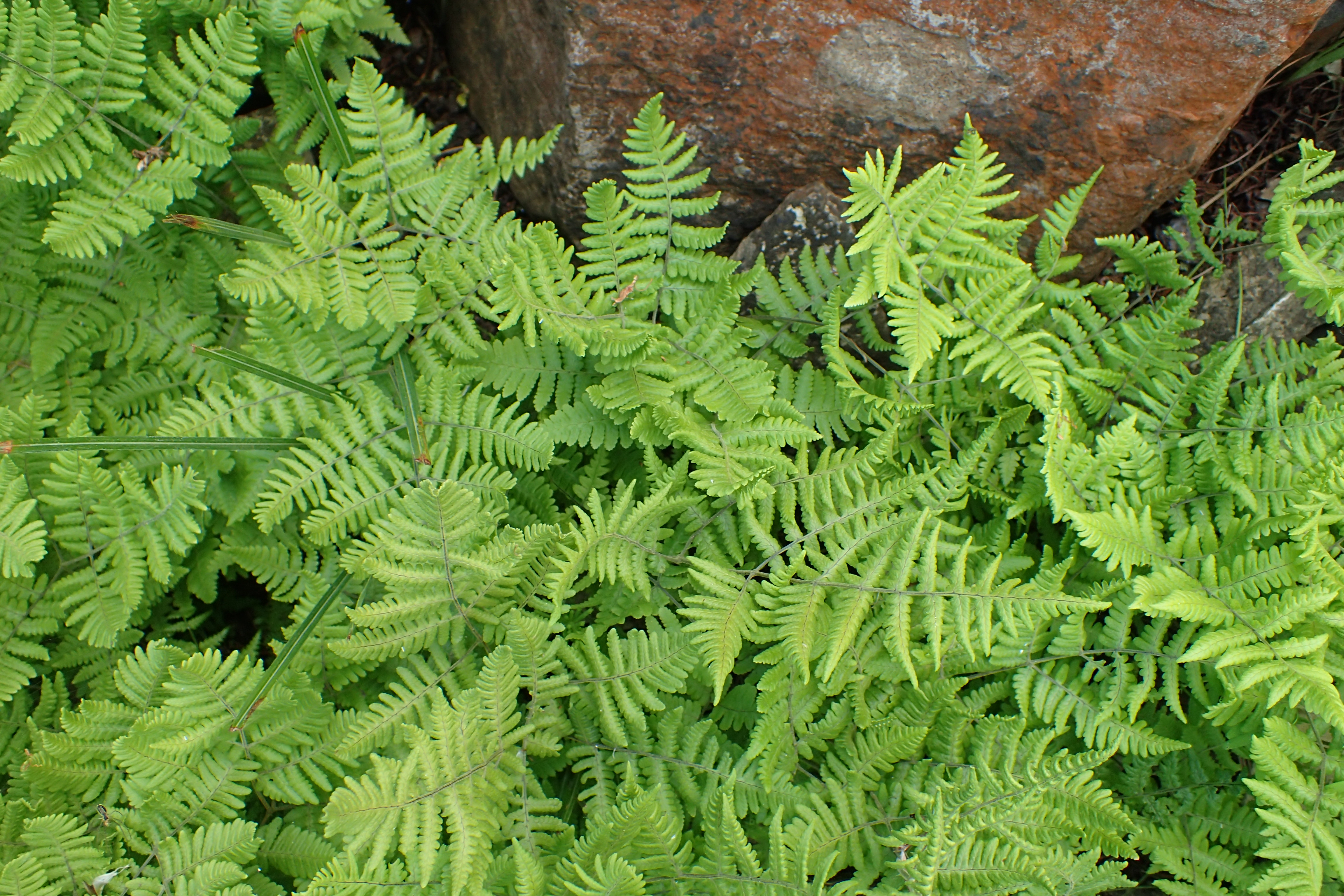 Gymnocarpium robertianum in the Botanischer Garten, Berlin-Dahlem